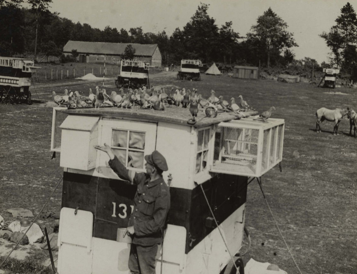 Sorrus, pendant la Grande Guerre : le service colombophile britannique, un pigeonnier sur voiture hippomobile.